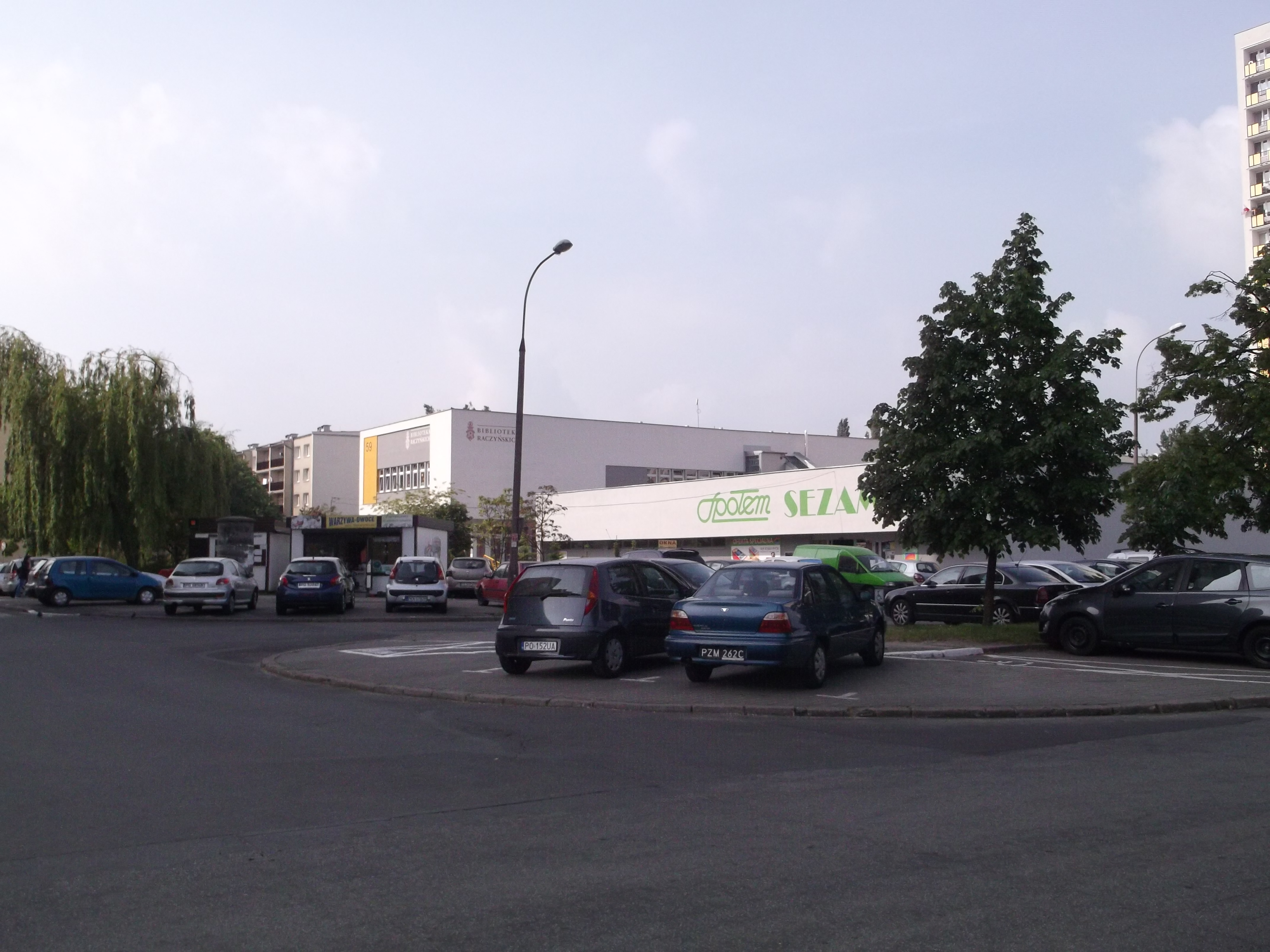 Osiedle Oświecenia w Poznaniu.